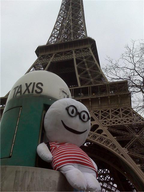 Stabri el muñeco que viaja de mano en mano en París